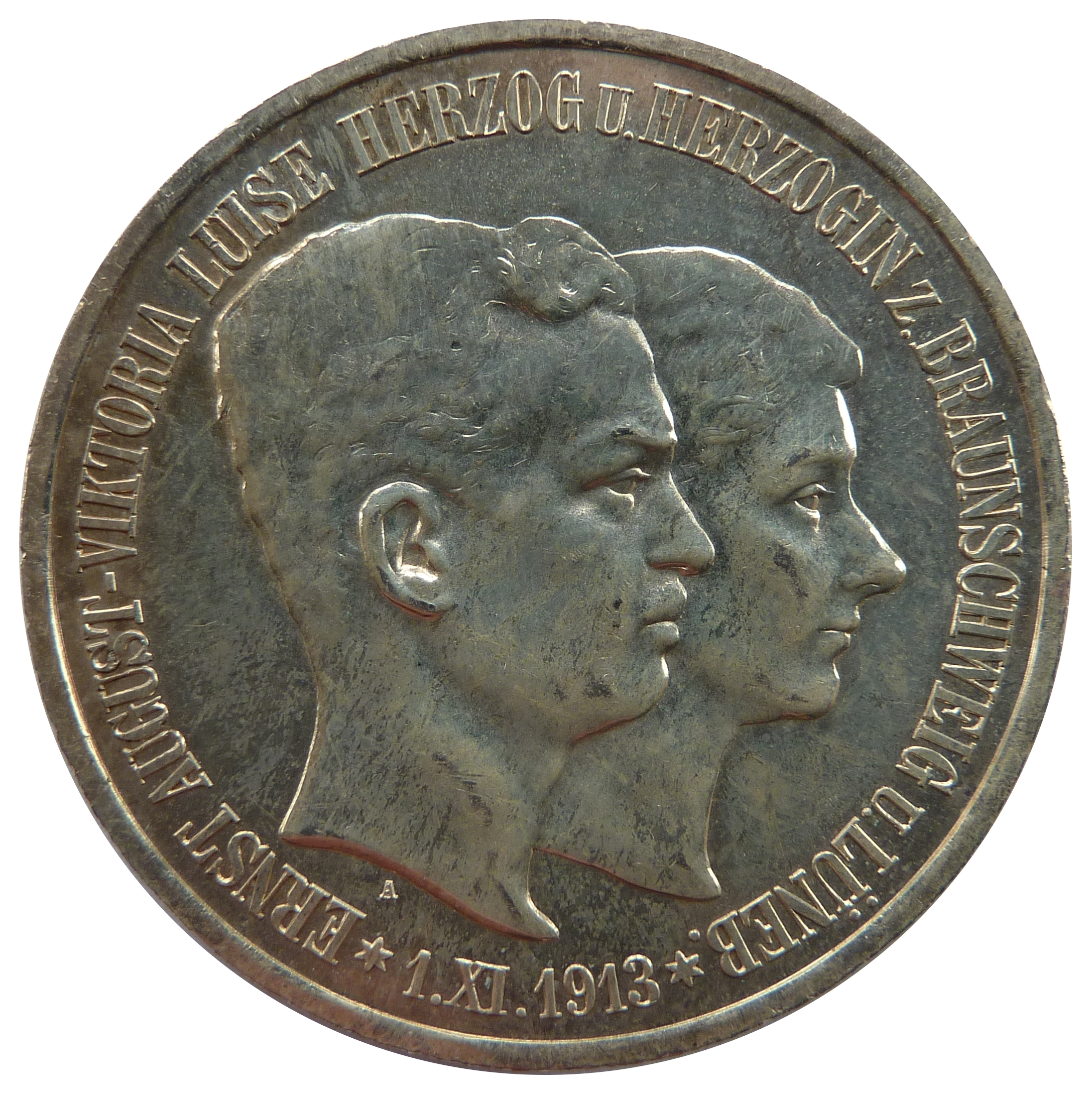 Vorderseite der 5-Mark-Gedenkmünze von Braunschweig-Lüneburg anlässlich der Hochzeit des Herzogs Ernst August mit Viktoria Luise